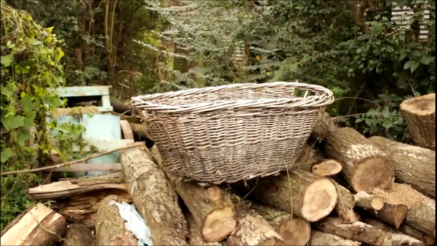 Foto de un canasto de mimbre sobre unos troncos de madera en la costa de Domínico. En la fotografía se puede observar en la parte central un canasto confeccionado en mimbre, el mismo fue extraído de las plantas ubicadas en la costa de Villa Domínico, avellaneda.La cestería fue una actividad económica muy importante en la zona.Los canastos se hacían para recolectar frutos y semillas evitando que se golpeen .Además con el mimbre se cubrían las botellas de forma decorativa para protegerlas .El mimbre crece en la zona ribereña por el clima y el relieve. La tala de arboles fue necesaria para leña y construcción de pilares para las viviendas de la zona.